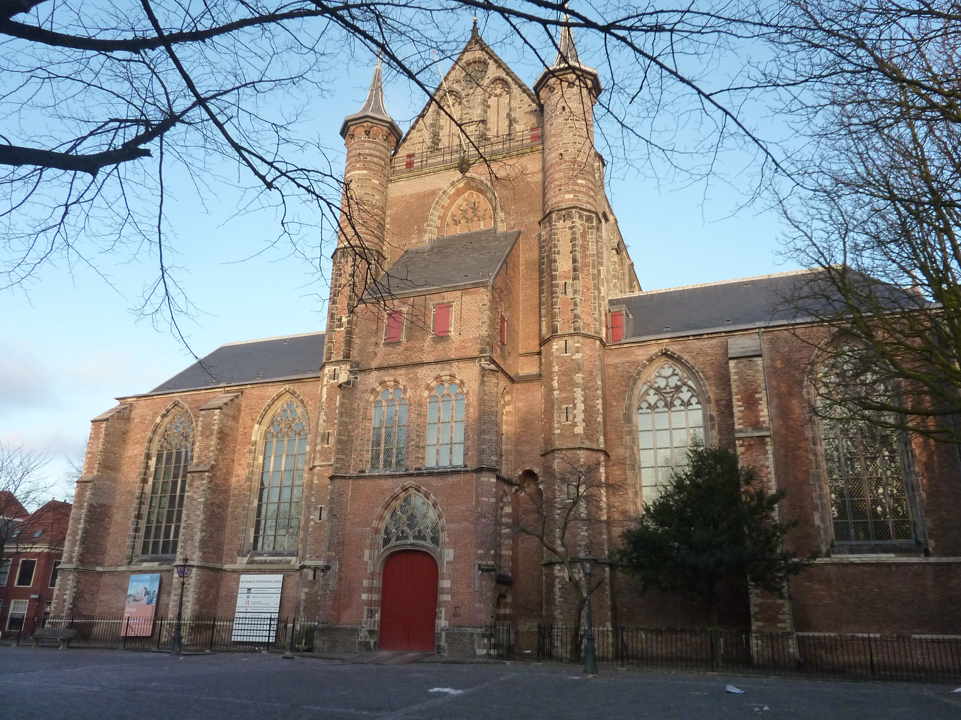 Leiden - Kloksteeg / Pieterskerk